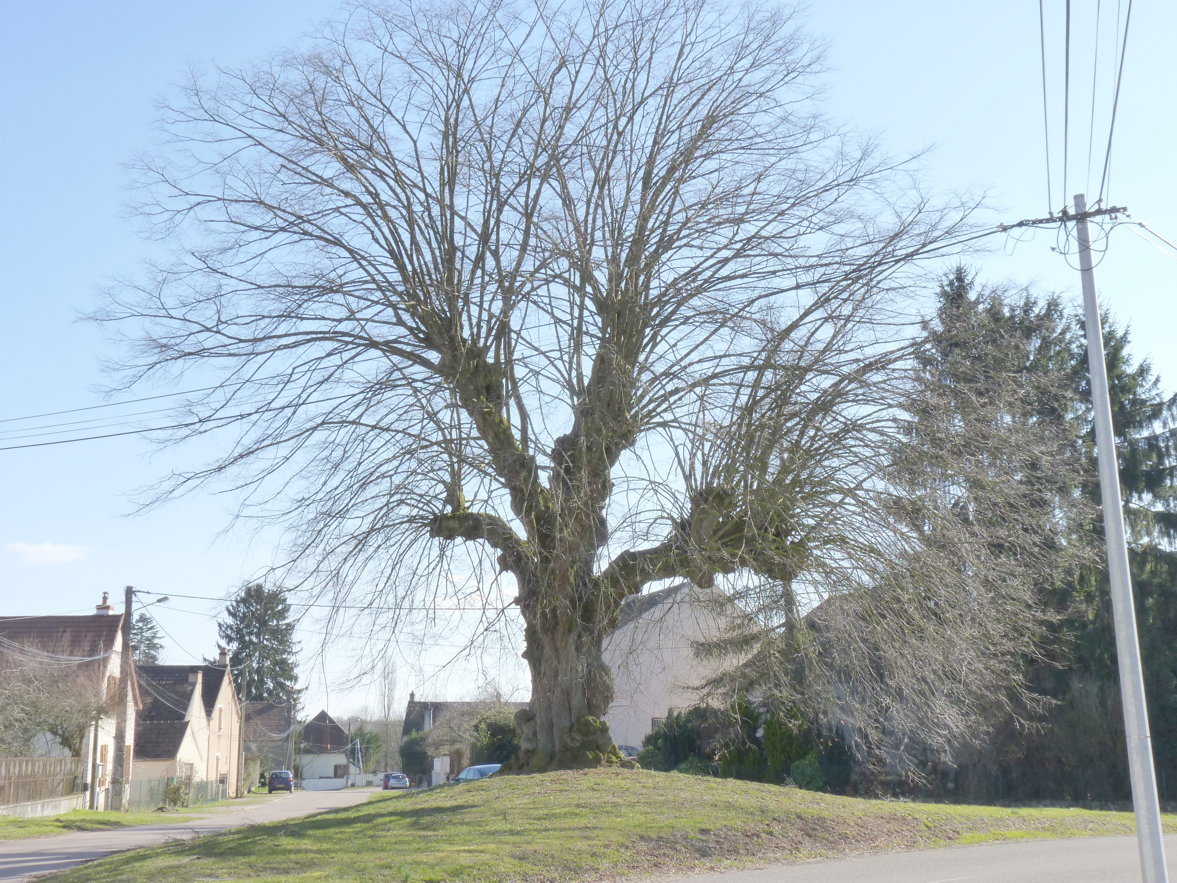 Un tilleul de Sully, arbre classé, ayant plus de 400 ans, en plein milieu du village, Magny-lès-Aubigny (Côte d'Or, Bourgogne, France)